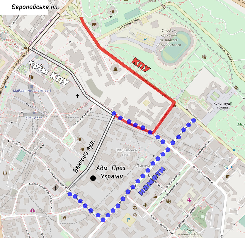 Хід акції "Повстань, Україно!" 16 вересня 2002 року в Києві. Рух колон демонстрантів від Європейської площі до Адміністрації Президента України і встановлення наметів. Реконструйовано за повідомленнями ЗМІ.